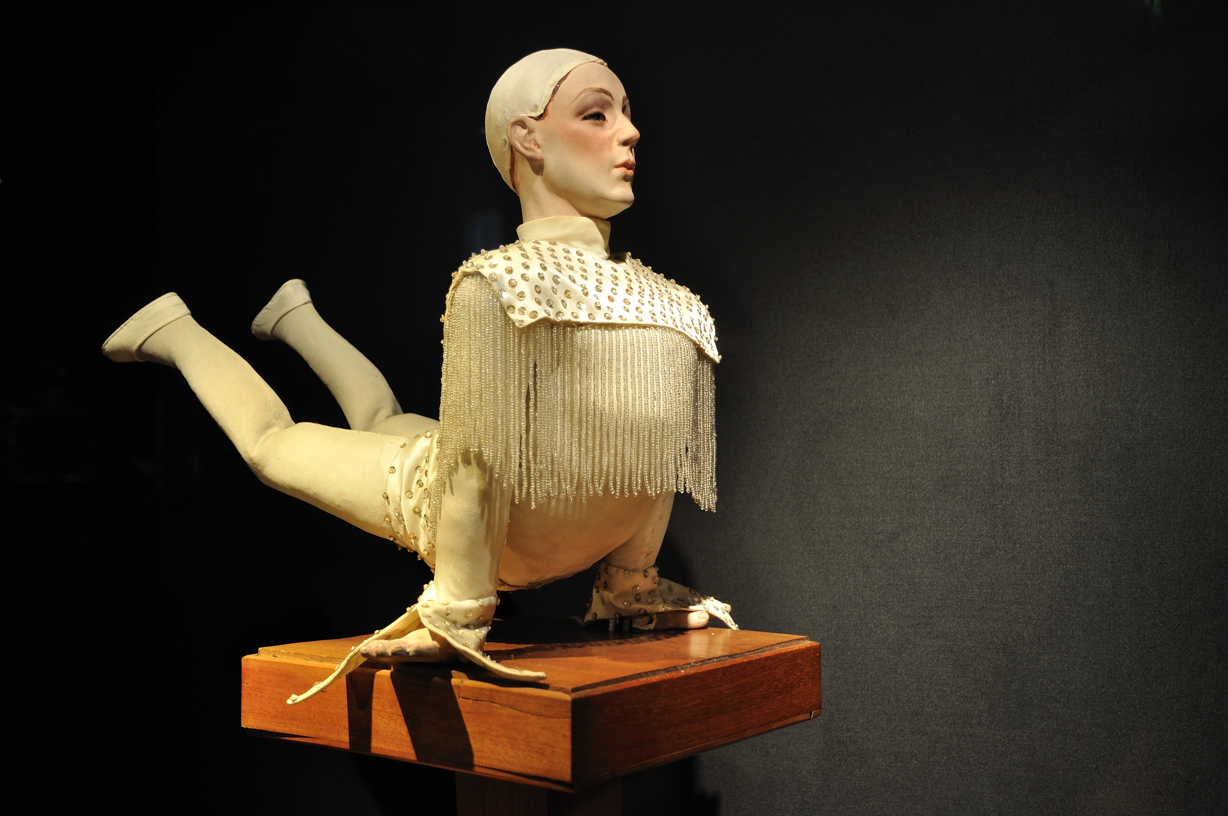 Le musée des Arts et Métiers de Paris dispose d'une collection exceptionnelle d'automates des XVIIIe, XIXe et XXe siècles.